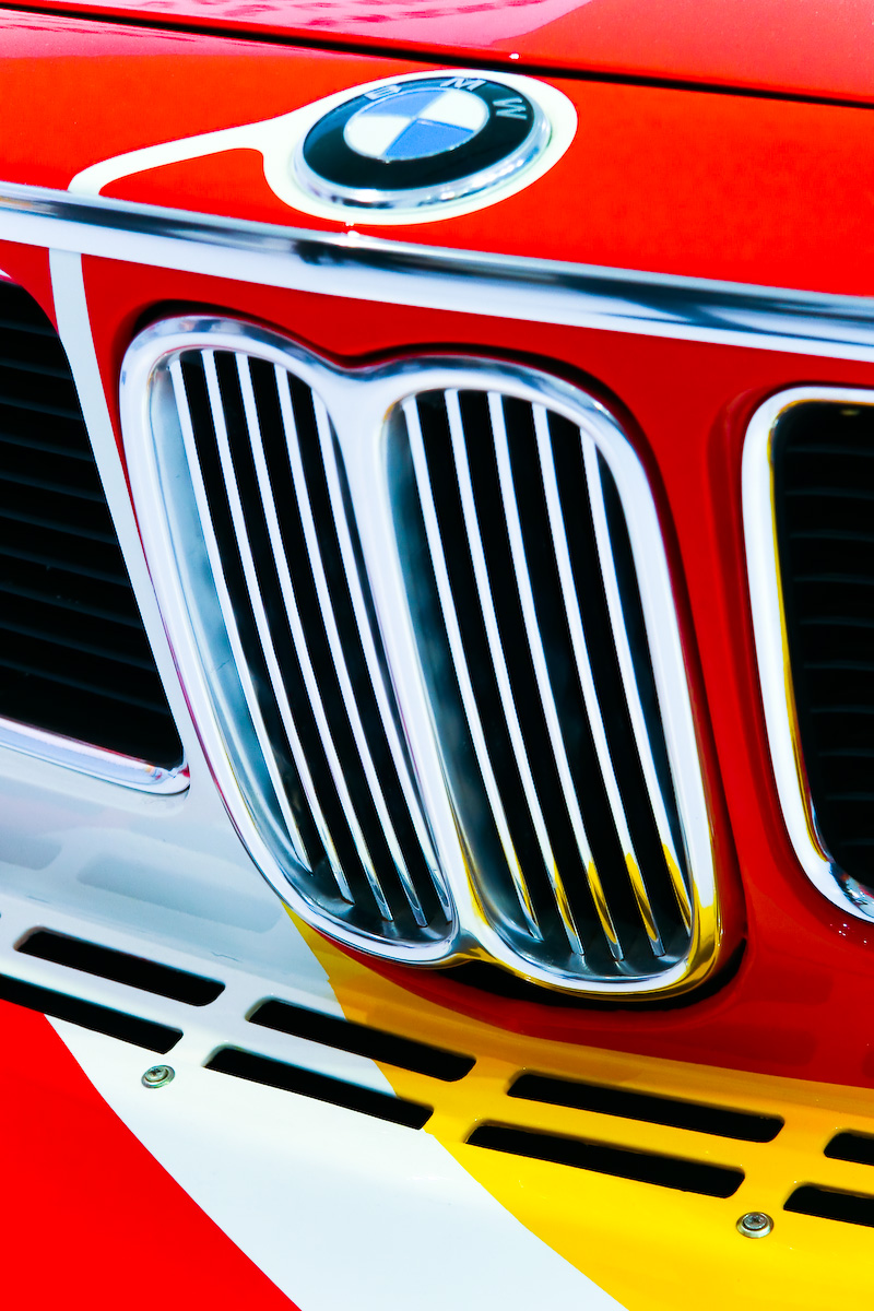 Alexander Calder 1975 BMW 3.0 CSL